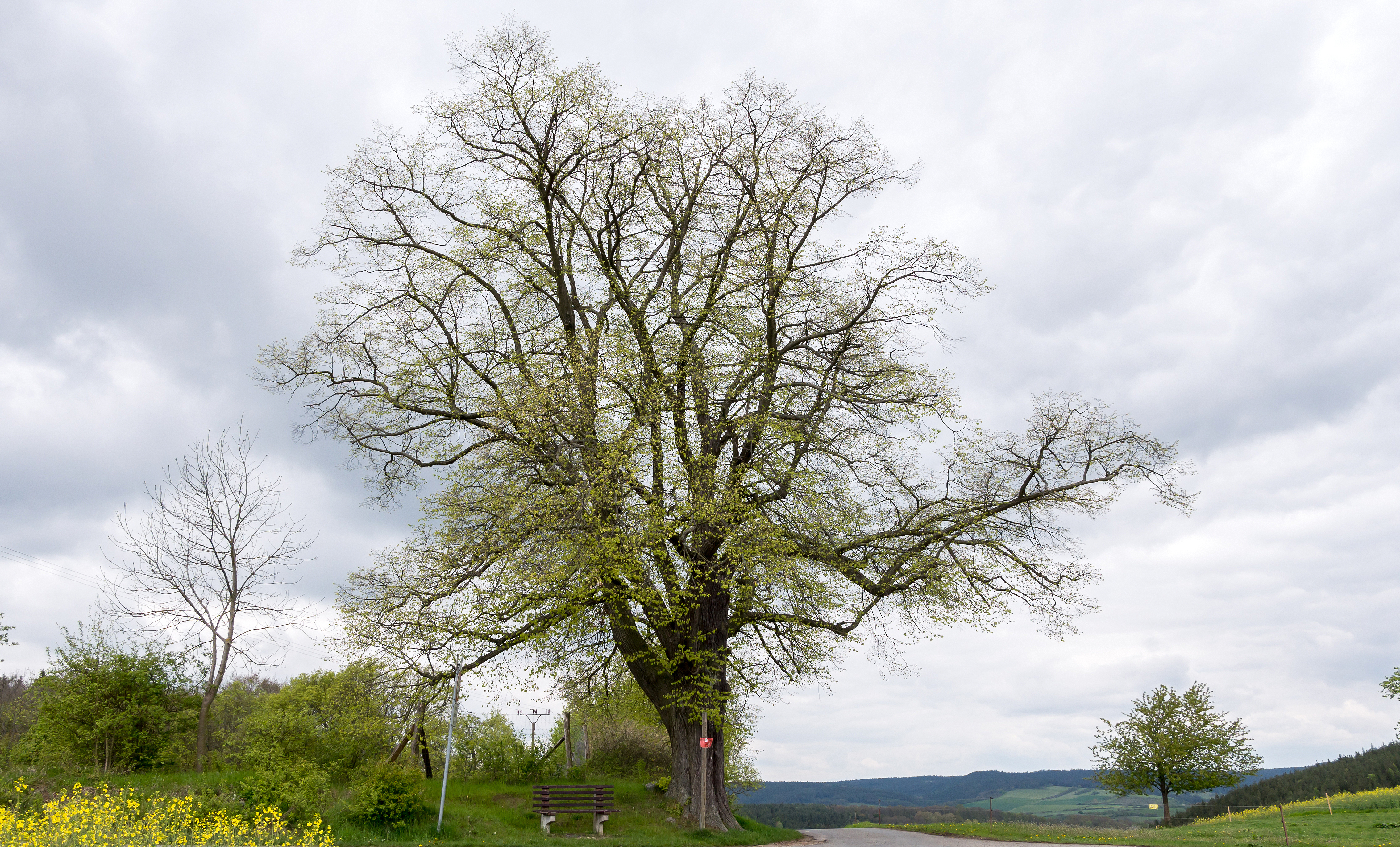 Fuchsbaum-Linde Listen Nr. 17 Lichstedt III